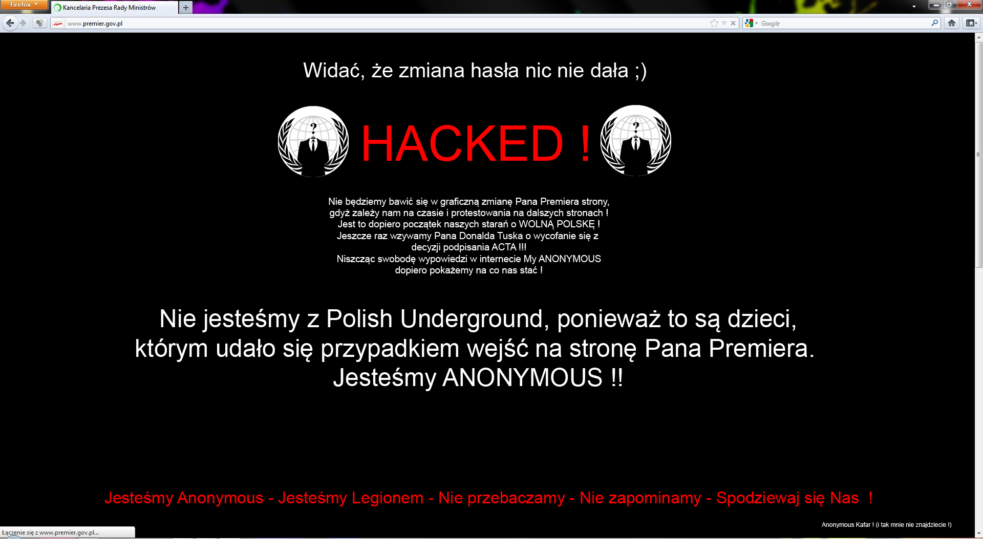 Anonymous atakuje strony rządu, pada strona Premiera Donalda Tuska.